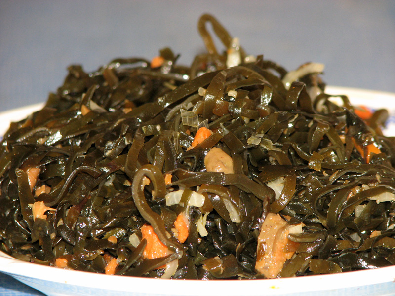 Ламинария сахаристая Saccharina latissima (Морская капуста)